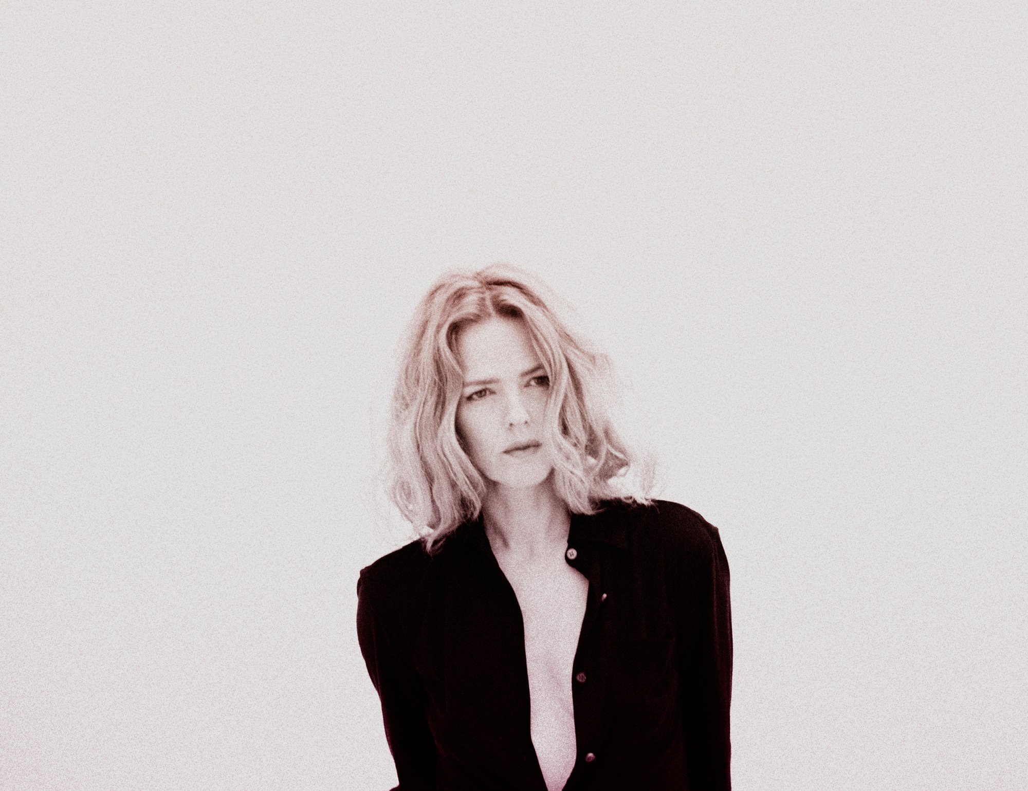 Fotografía promocional perteneciente a "Lo nuestro" (El Segell del Primavera, 2015). Autor: Víctor Garrido